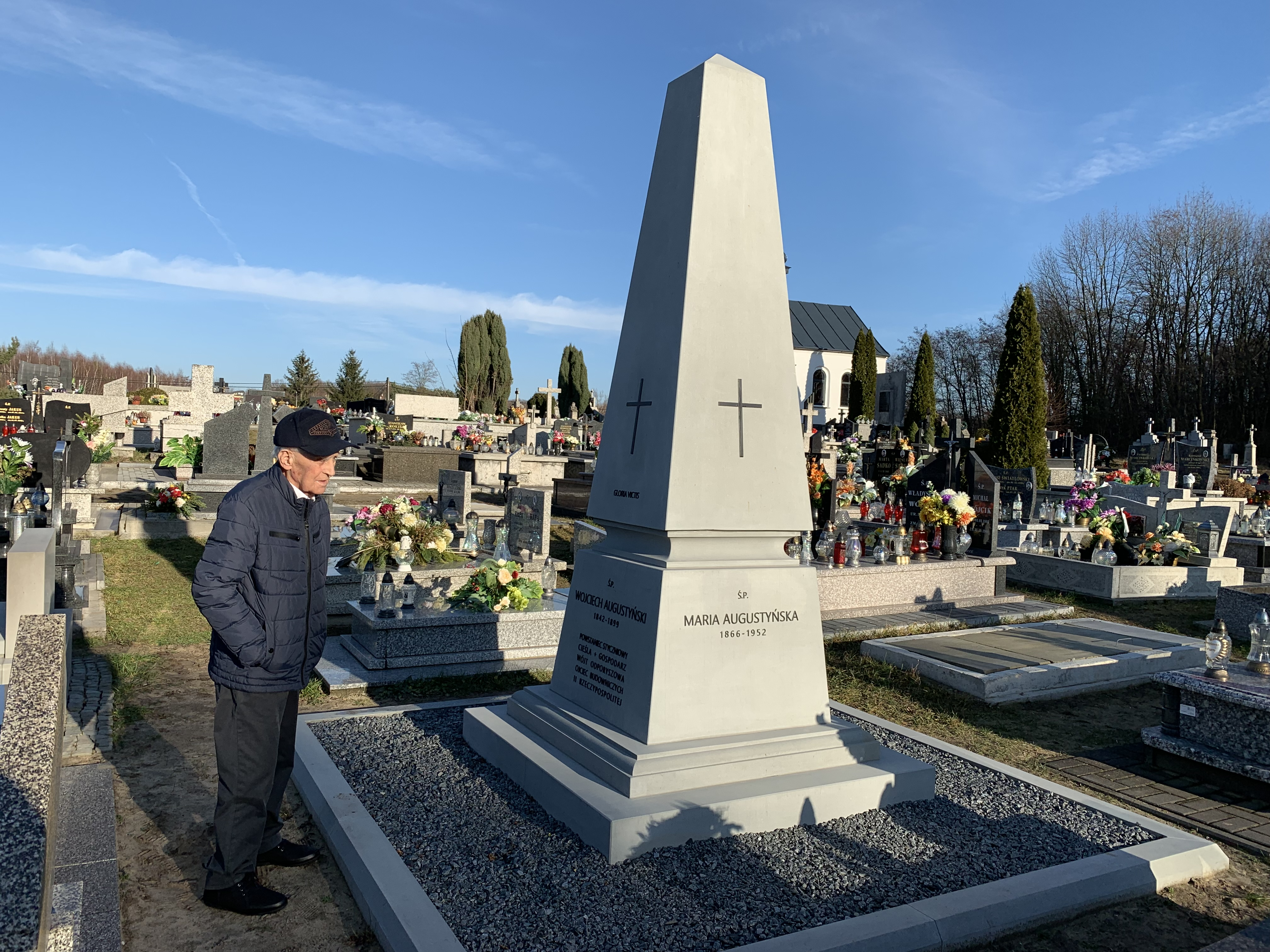 Grób Wojciecha Augustyńskiego na cmentarzu w Odporyszowie. Obok niego spoczywają żona Elżbieta i córka Maria